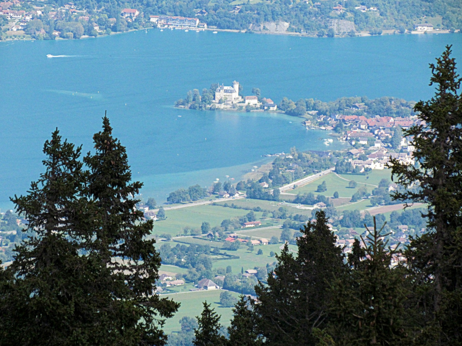 Vue sur la presqu'île et le château de Duingt depuis la montagne du Semnoz # Haute-Savoie (74) .